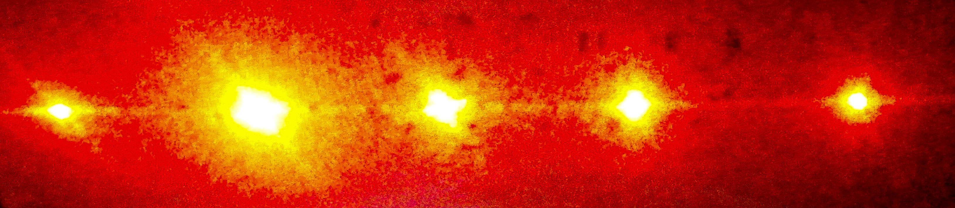 Láser difractado usando una rejilla de 100 líneas, Foto tomada en el laboratorio de óptica de la facultad de ciencias de la unam.